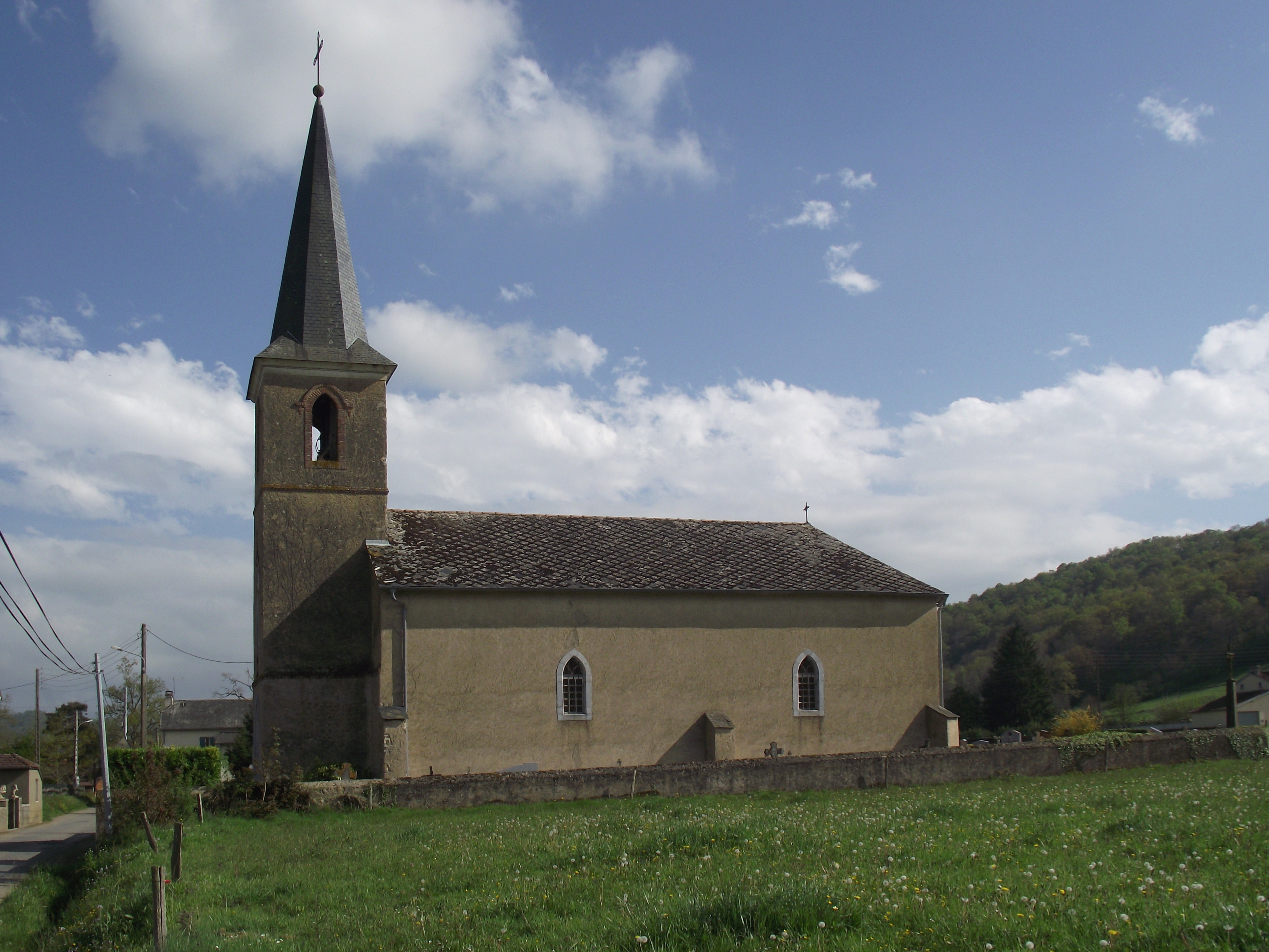 Église d'Ozon Darré (Hautes-Pyrénées, France)